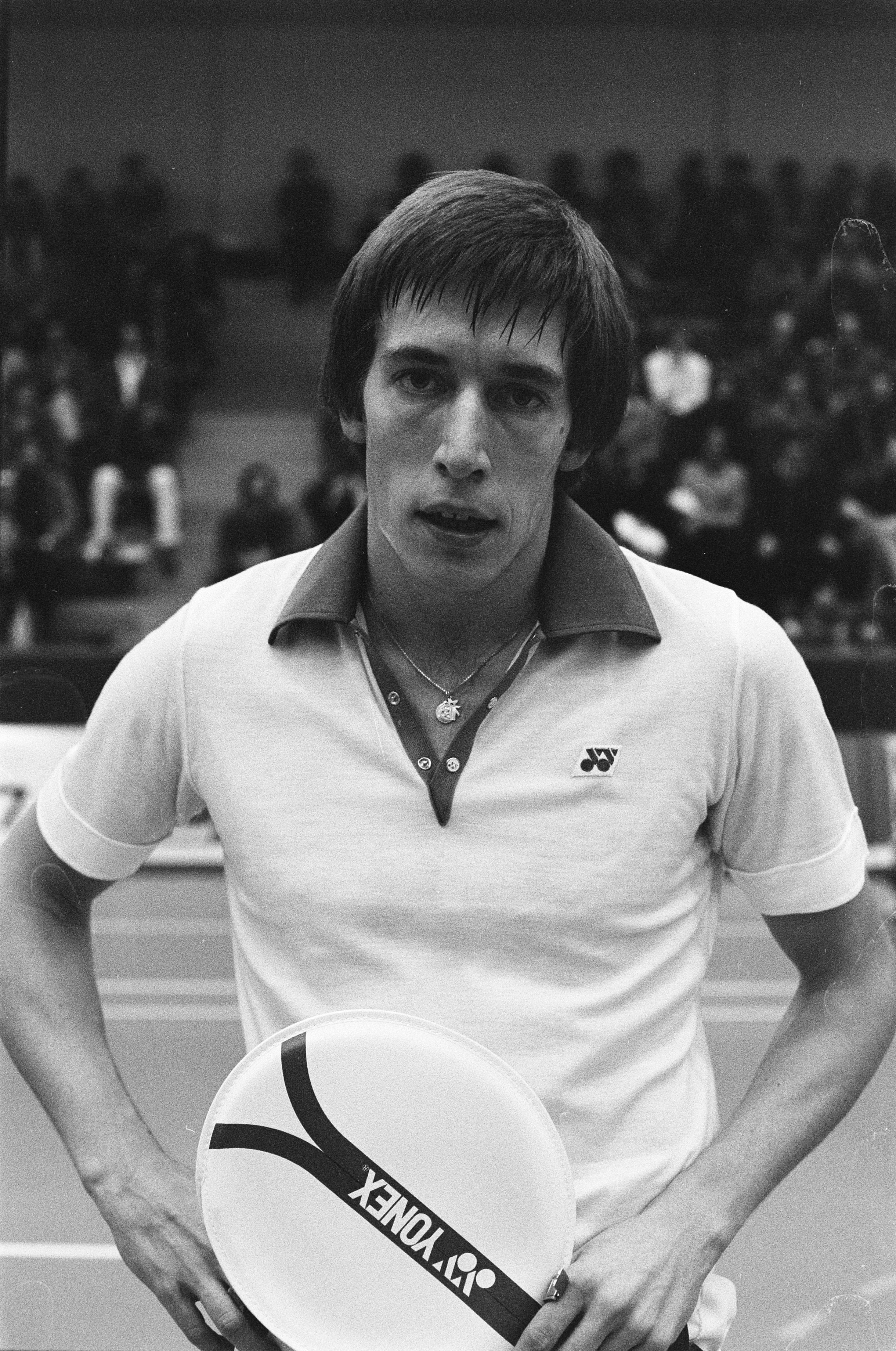 Collectie / Archief : Fotocollectie Anefo Reportage / Serie : Nationale Kampioenschappen Badminton te Utrecht Beschrijving : Rob Ridder Datum : 9 december 1979 Locatie : Utrecht (stad)/Utrecht (prov) Trefwoorden : badminton, portretten, sport, wedstrijden Persoonsnaam : Ridder, Rob Fotograaf : Pereira, Fernando / Anefo, [onbekend] Auteursrechthebbende : Nationaal Archief Materiaalsoort : Negatief (zwart/wit) Nummer archiefinventaris : bekijk toegang 2.24.01.05 Bestanddeelnummer : 930-5775